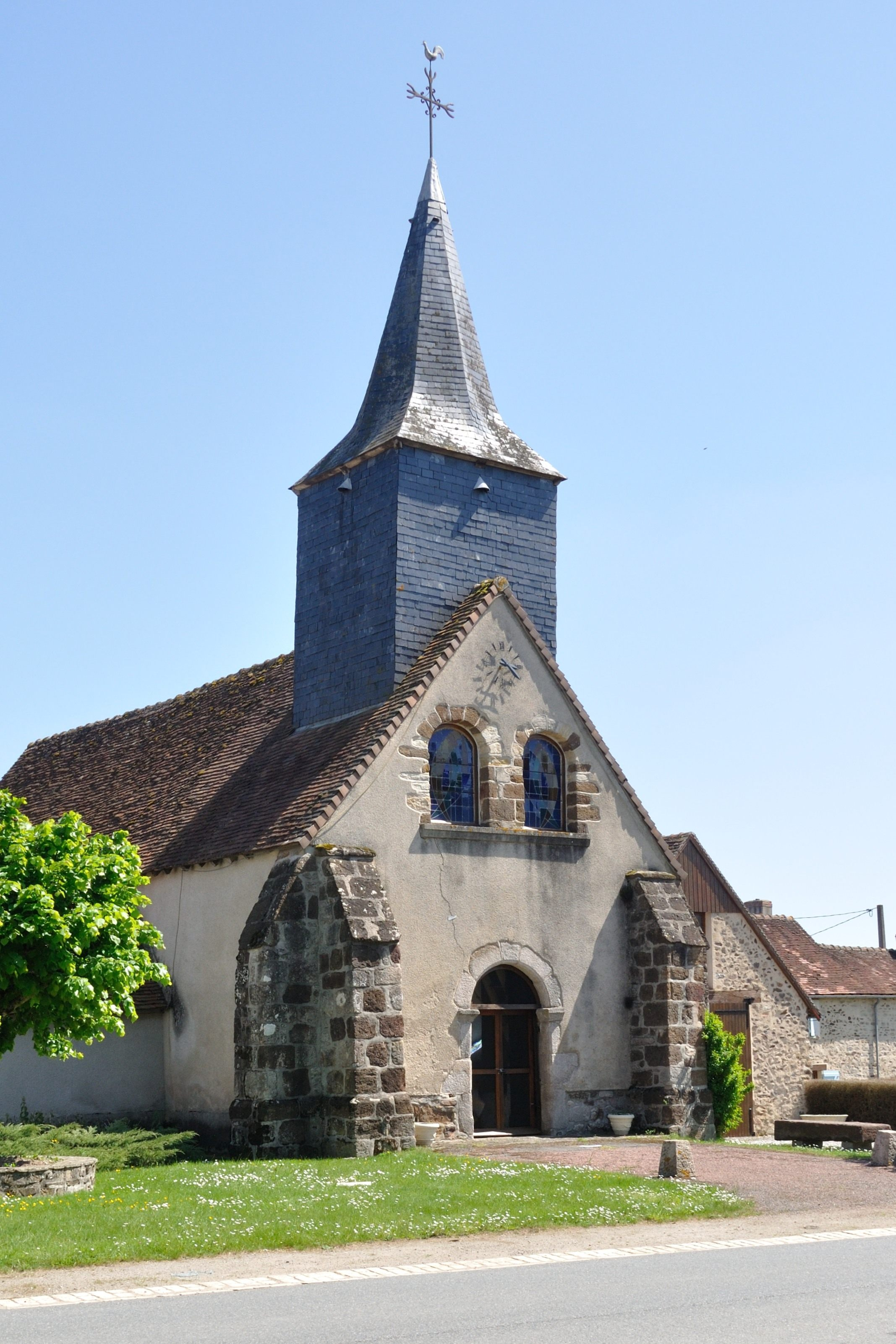 Eglise de Bonneuil - Indre